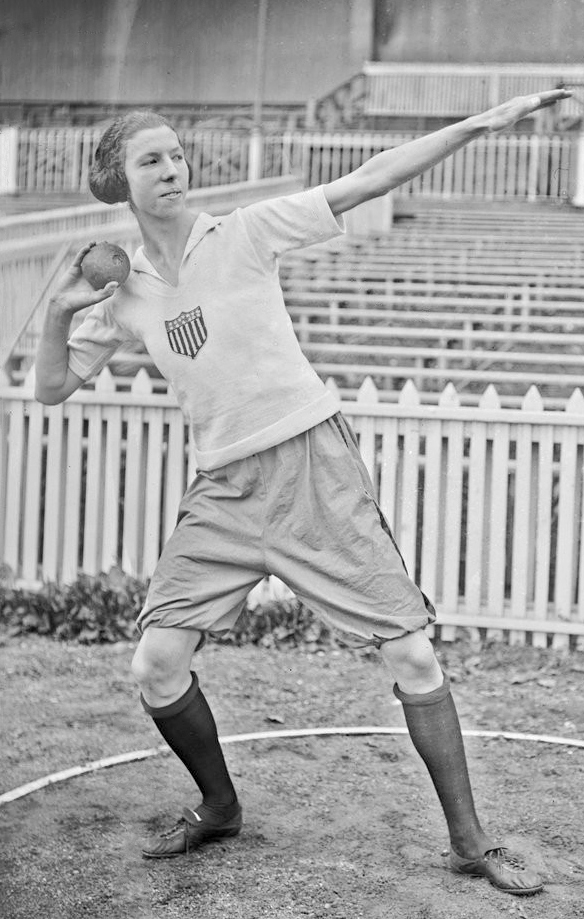 [10-8-22, Colombes,] miss [Lucile] Godbold, Amérique, lancement du poids : [photographie de presse] / [Agence Rol]